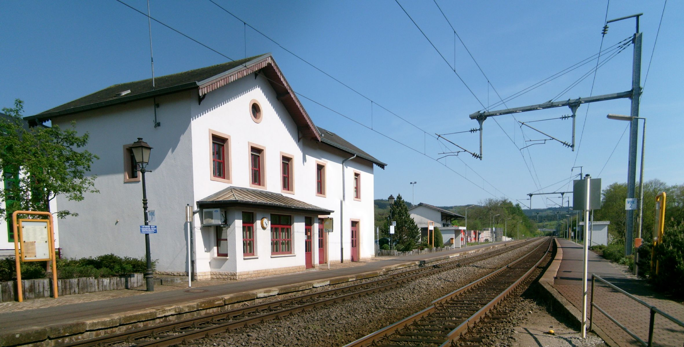 D'Gare Wëlwerwolz, 9. Mee 2008.